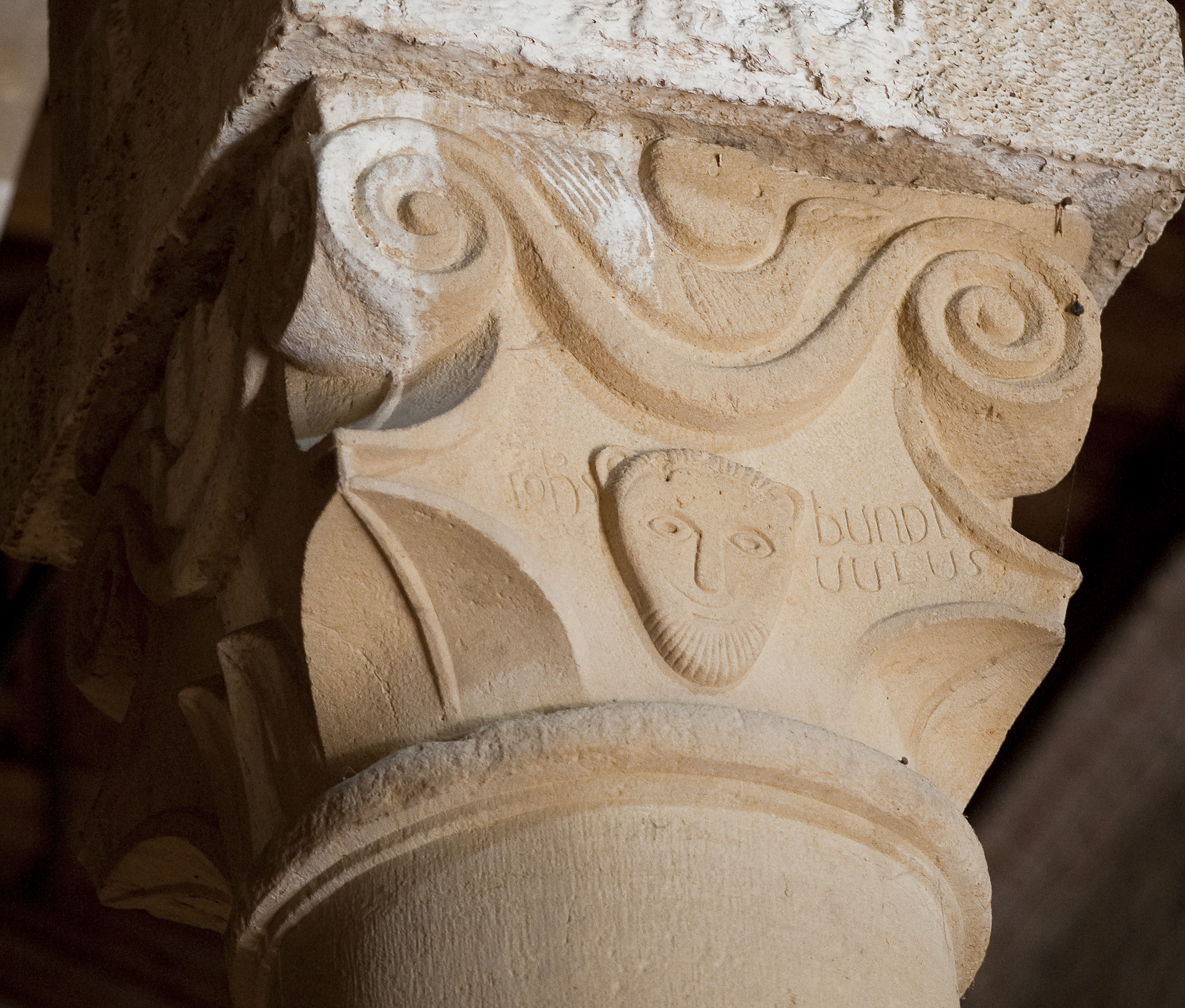 Capitello firmato JOH BUNDI VULUS, Pieve di Santa Maria Assunta a Chianni, Gambassi terme